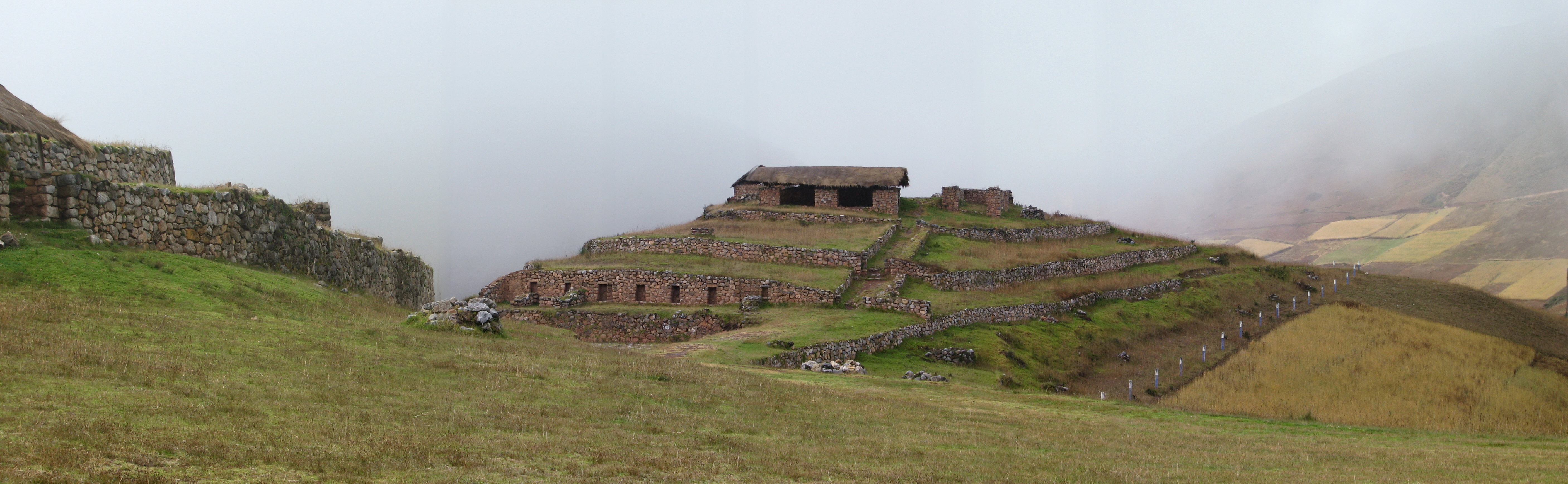 Sondor Archaeological site (panorama)